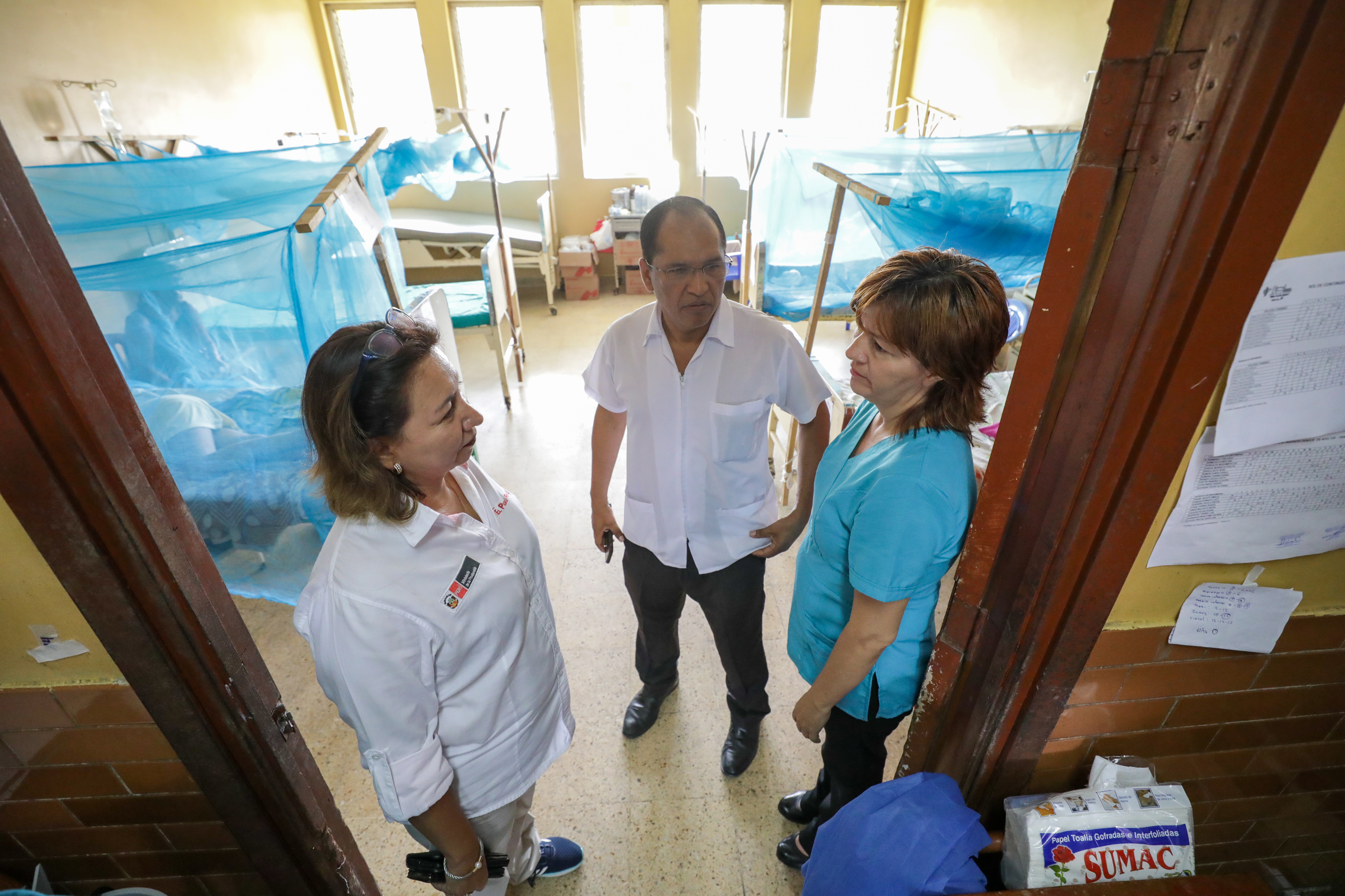 La Ministra de la Producción, Rocío Barrios, recorre los hospitales, centros de salud y educativos de la ciudad de Iquitos, en representación del ejecutivo, para supervisar las acciones de prevención y mitigación del Dengue, COVID-19 y la Leptospirosis.